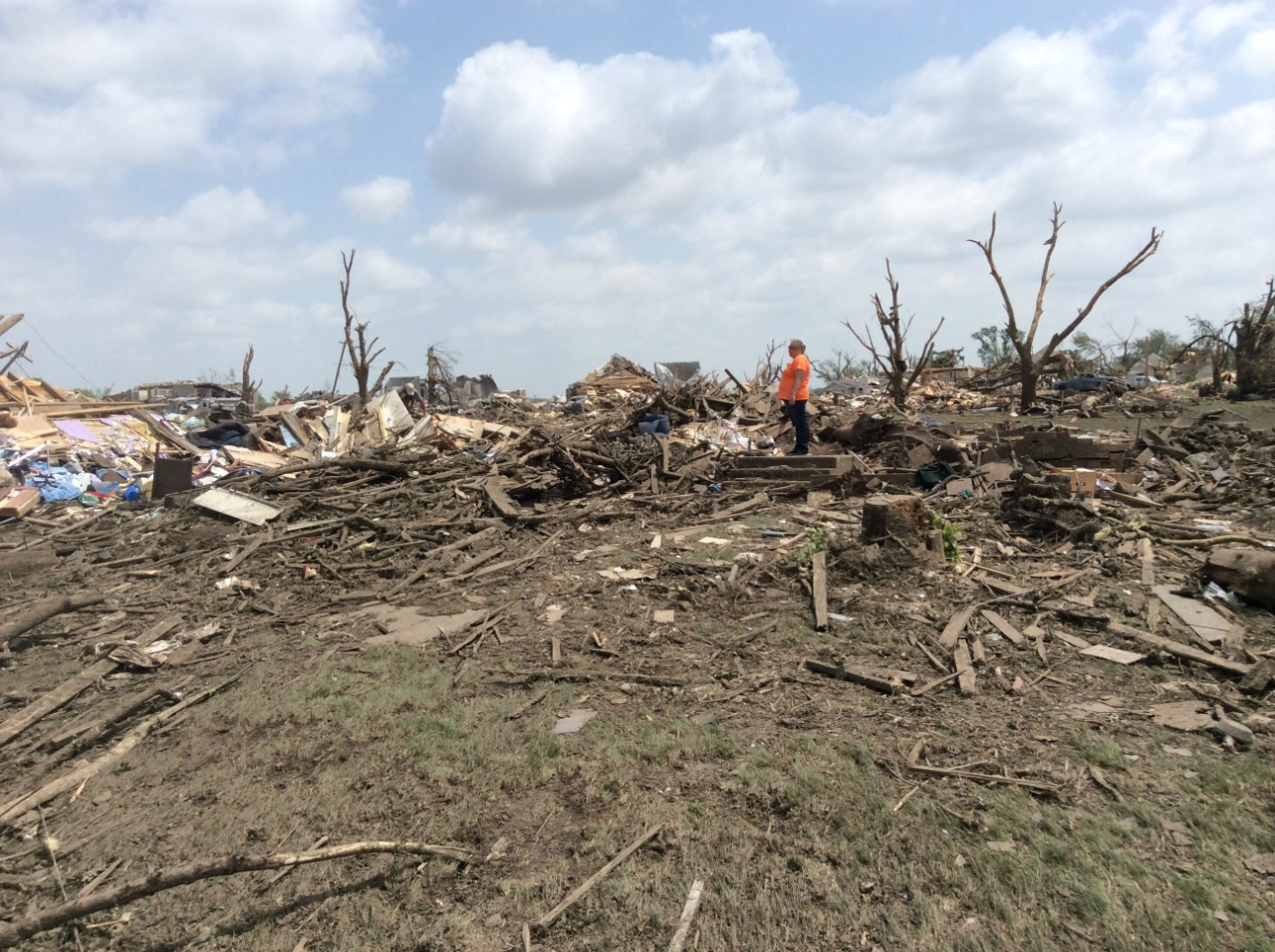 EF4 damage to homes in Pilger, Nebraska